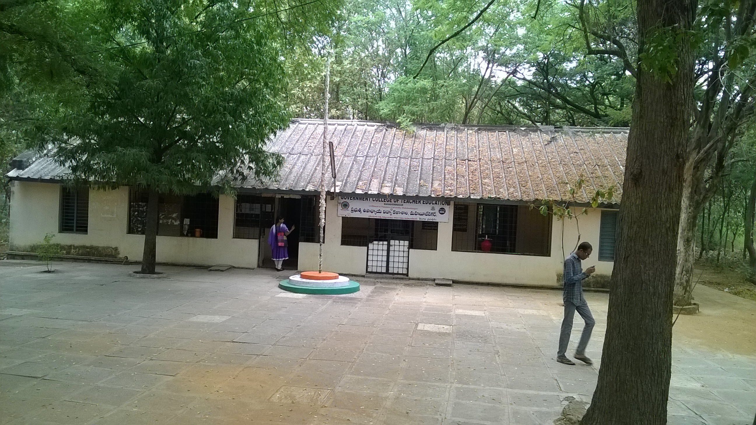 ప్రభుత్వ ఉపాధ్యాయ విద్యా కళాశాల, మహబూబ్ నగర్